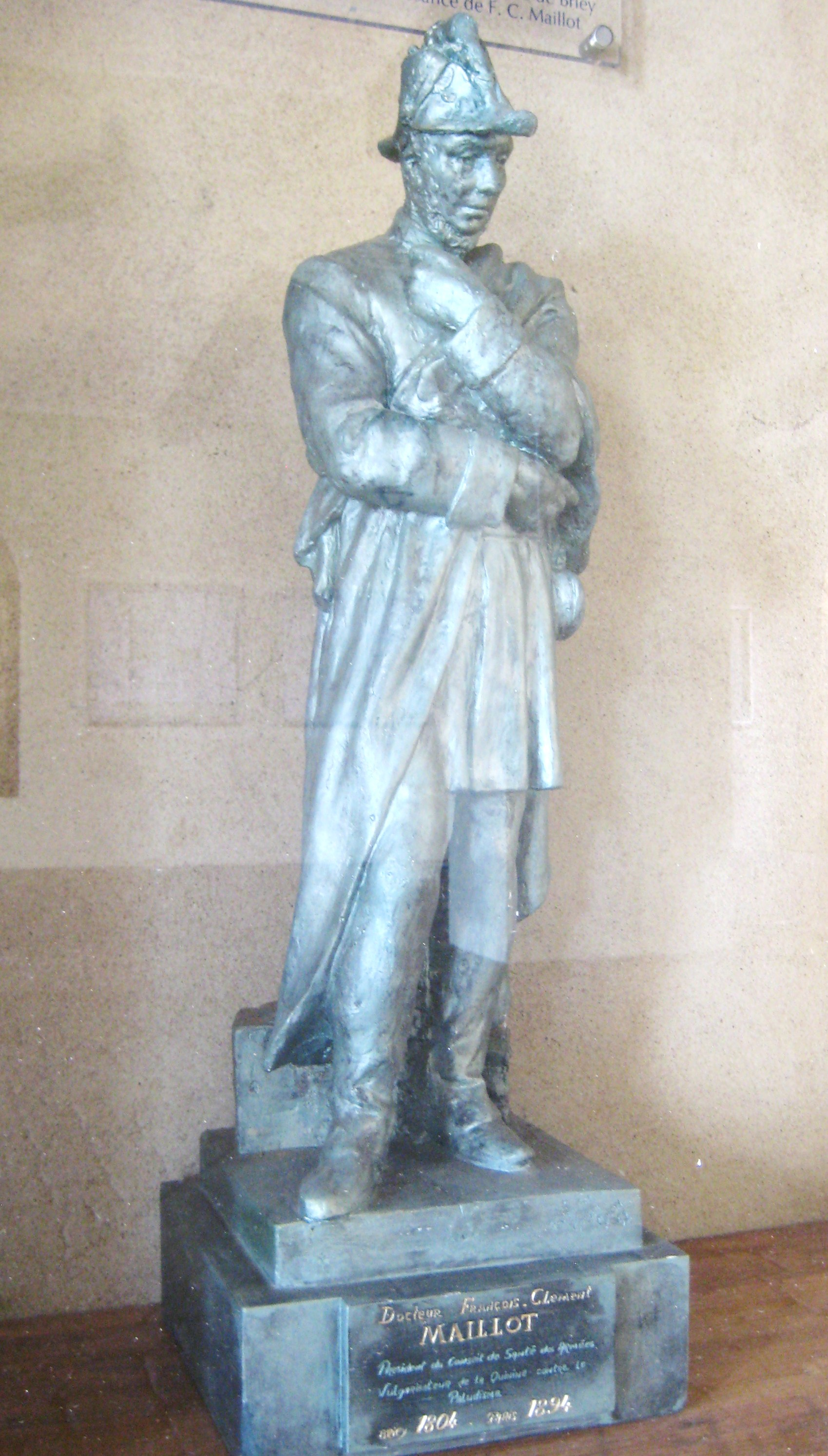 Francois Maillot Briey